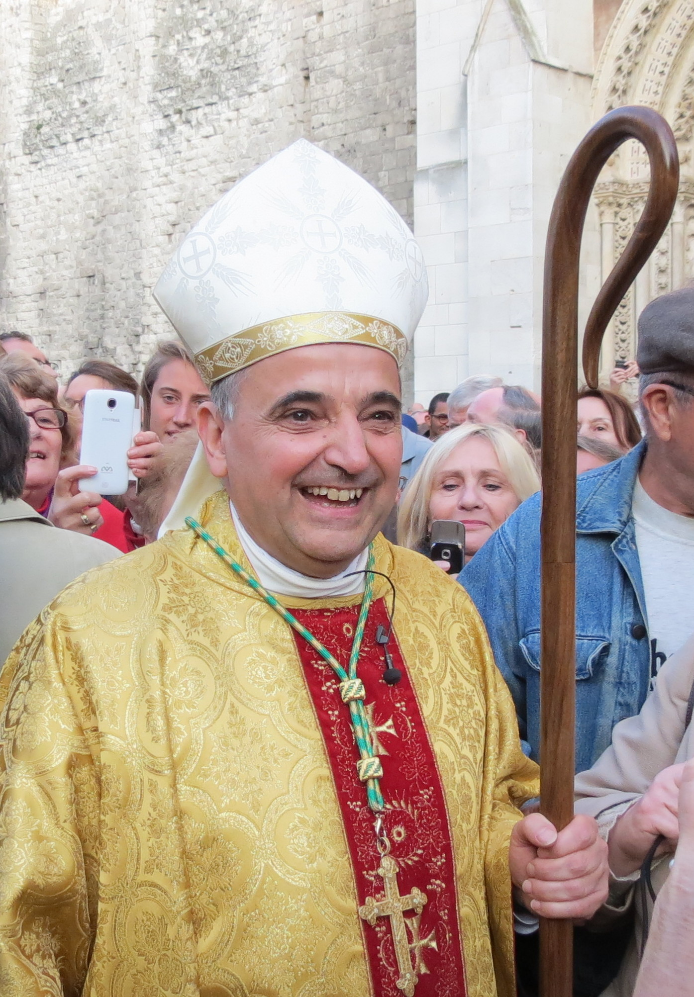 Dominique Lebrun, sur le parvis de la cathédrale de Rouen, après la messe d'inauguration de son ministère le 11 octobre 2015.